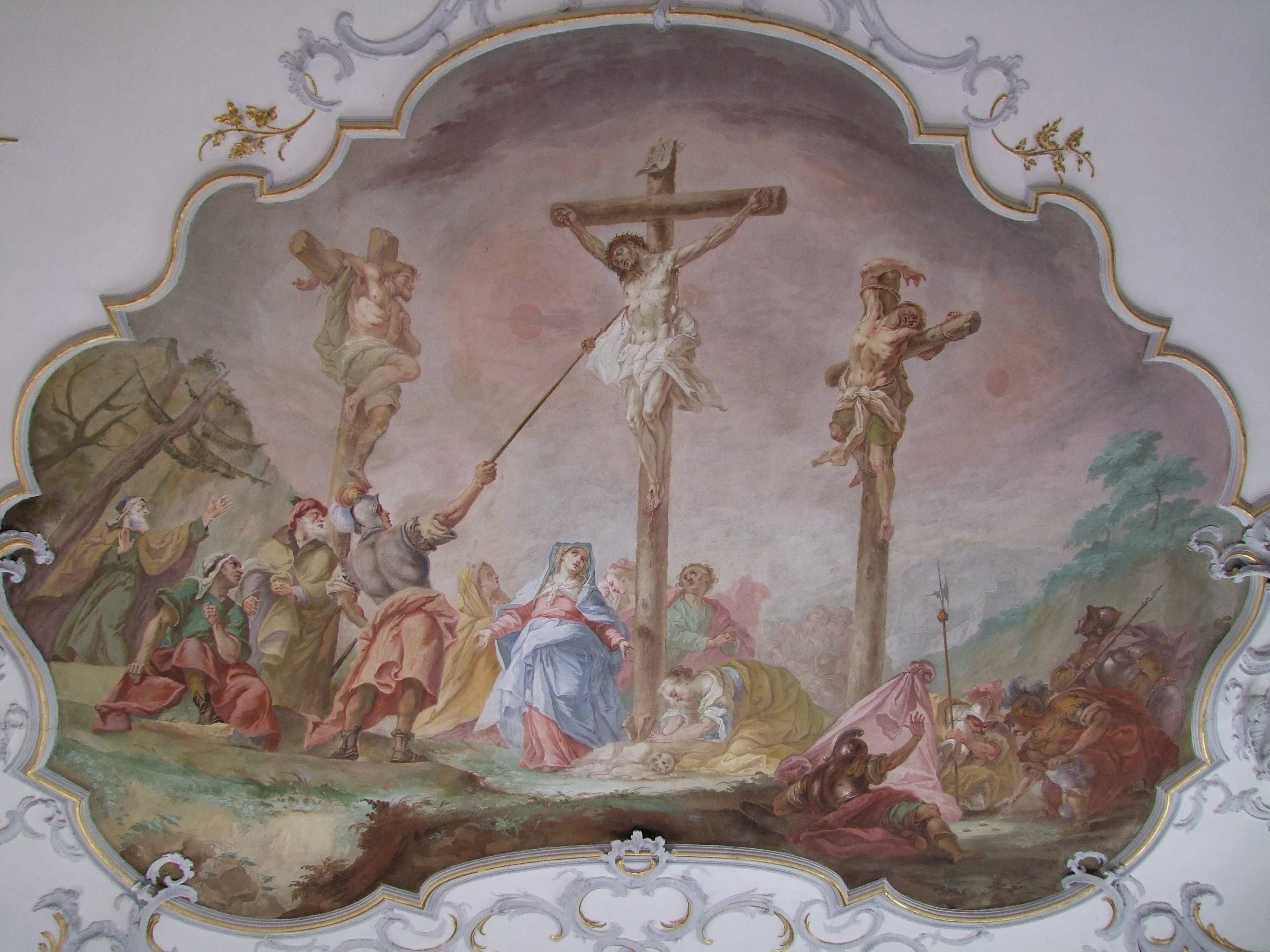 Unserer Lieben Frau im oberschwäbischen Oberrammingen,, Ortsteil von Rammingen in Bayern/Schwaben